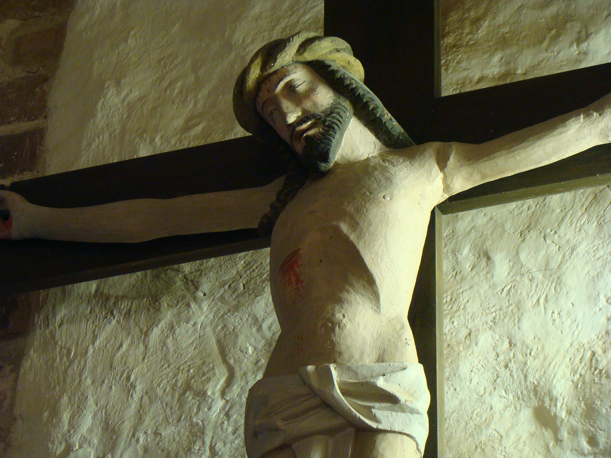 Kruzifix in der Kirche von Groß Gievitz. Foto: Peter Schmelzle 2011